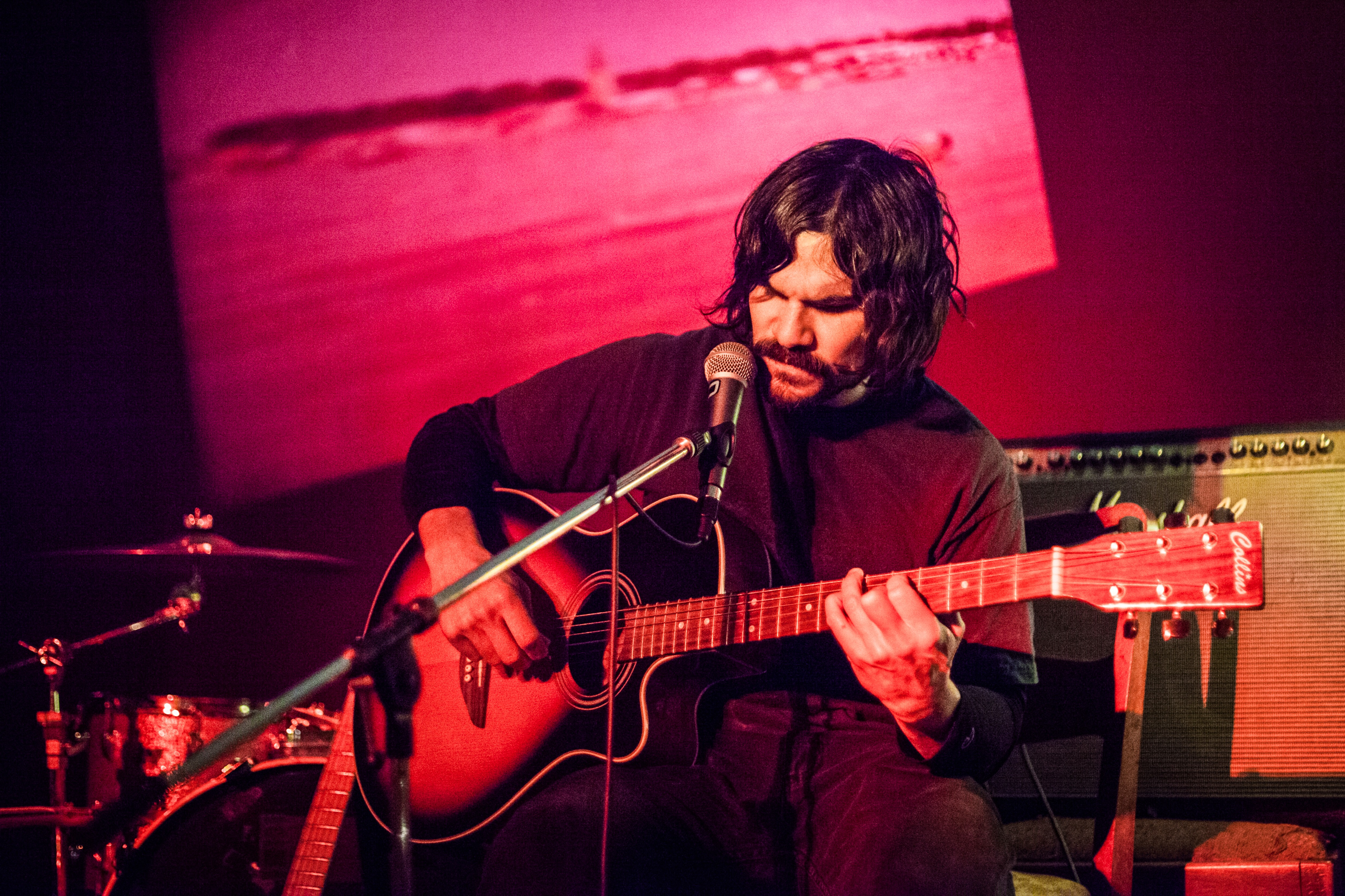 Victor Villarreal playing live in Dresden, Germany